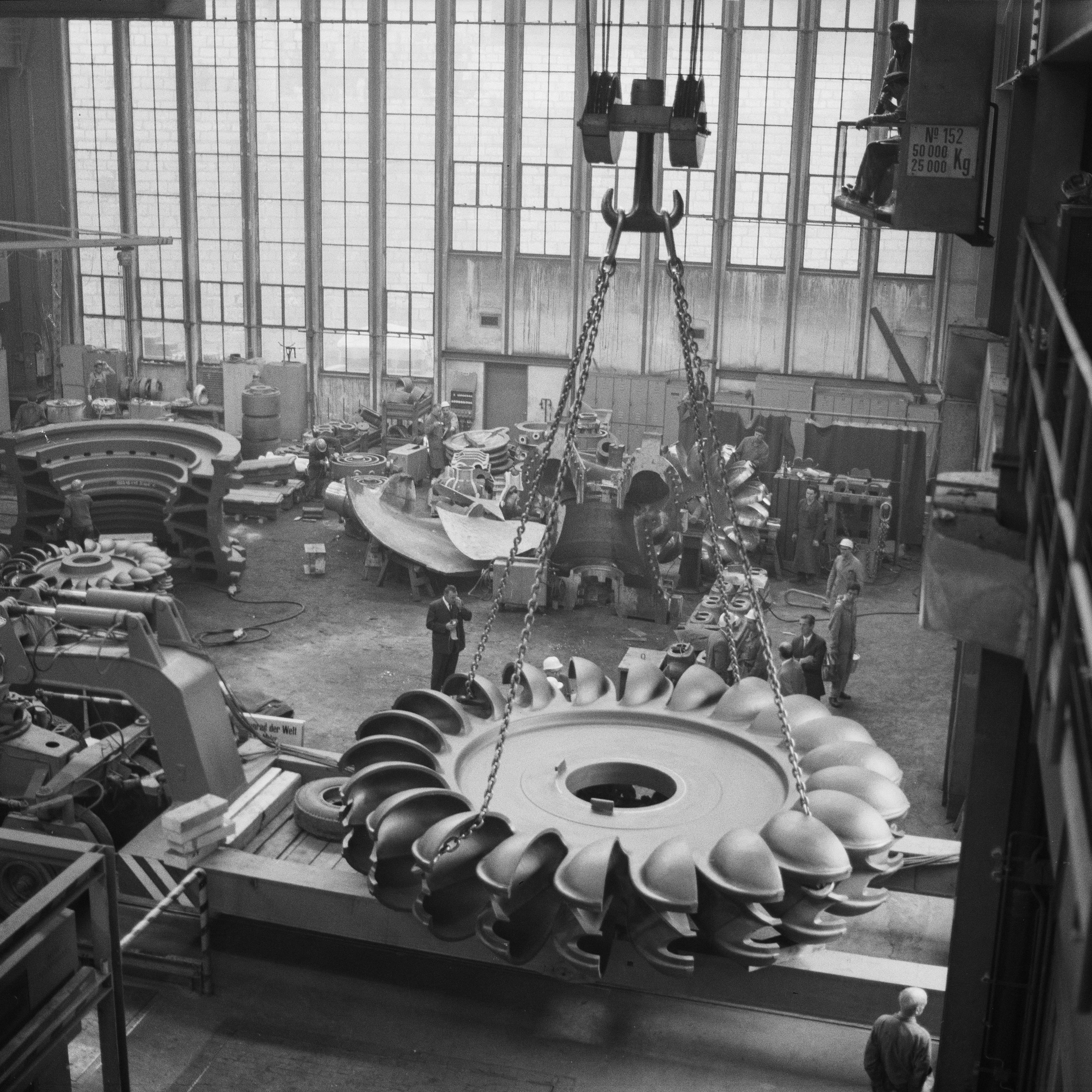 Transport des Peltonrades "New Colgate"